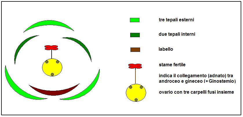 Ophrys iricolor maxima - Diagramma fiorale